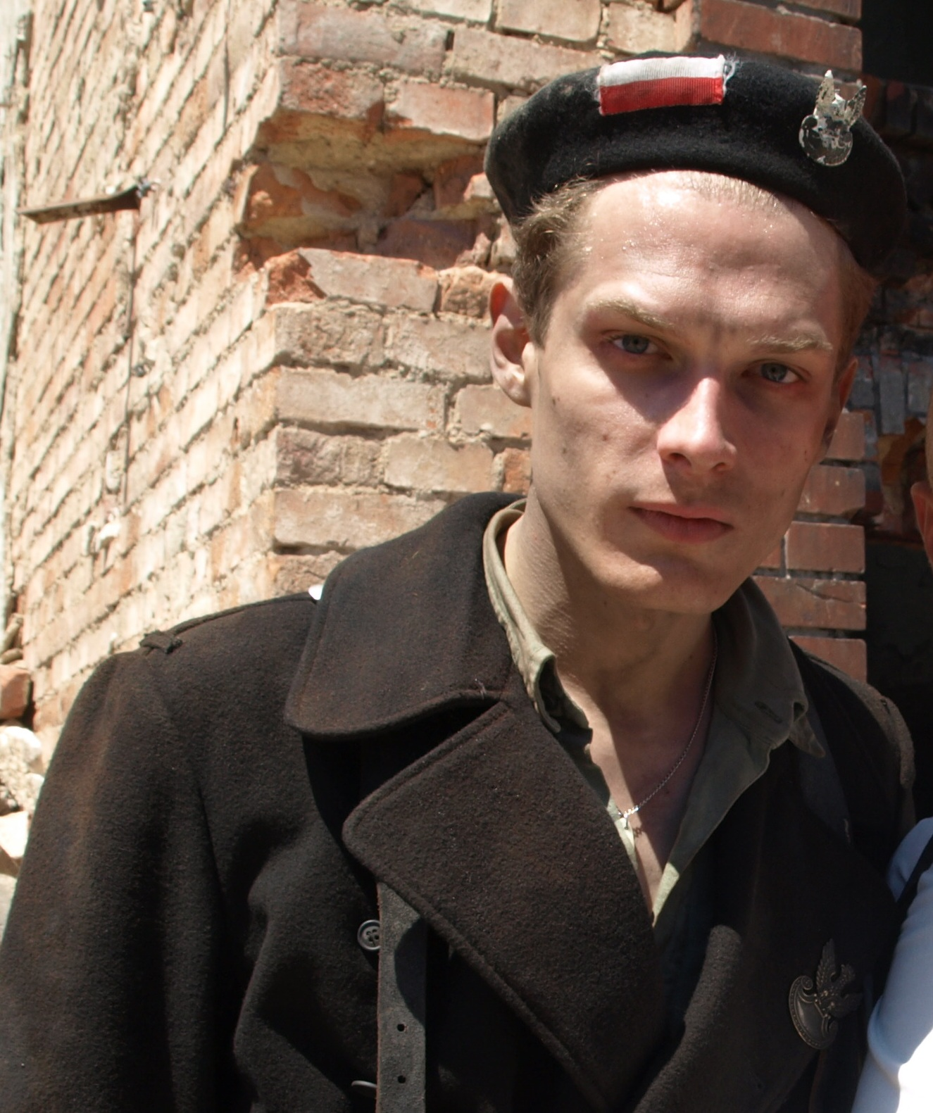 Aktor Adam Fidusiewicz.